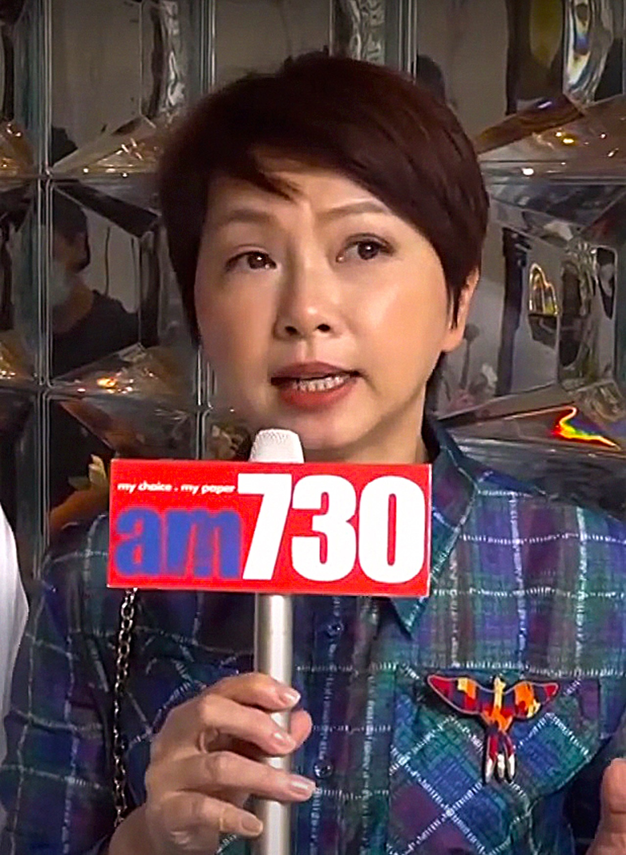 中文（香港）: 112mountainyam 2020秋冬系列發布會